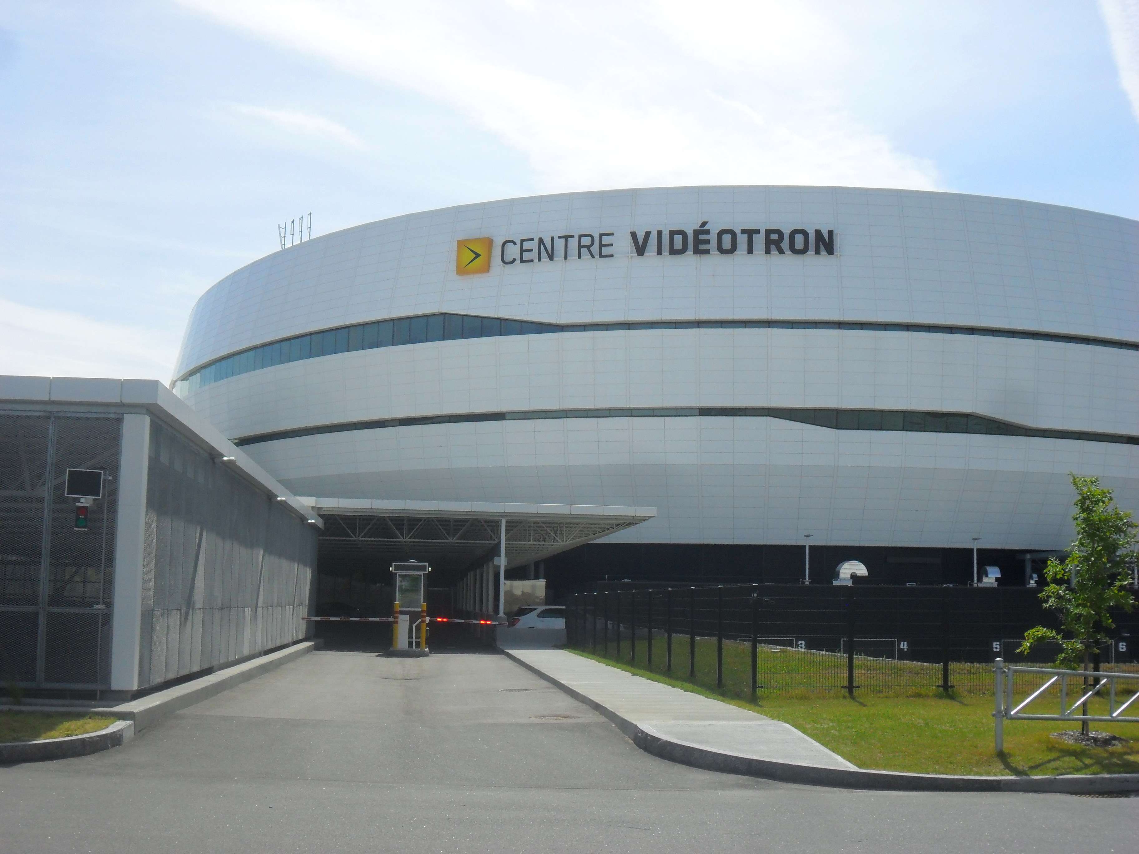 Centre Vidéotron, façade est